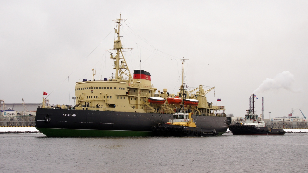 Ледокол Красин возвращается из ремонта на место стоянки с использованием буксиров Акмал и Тайфун